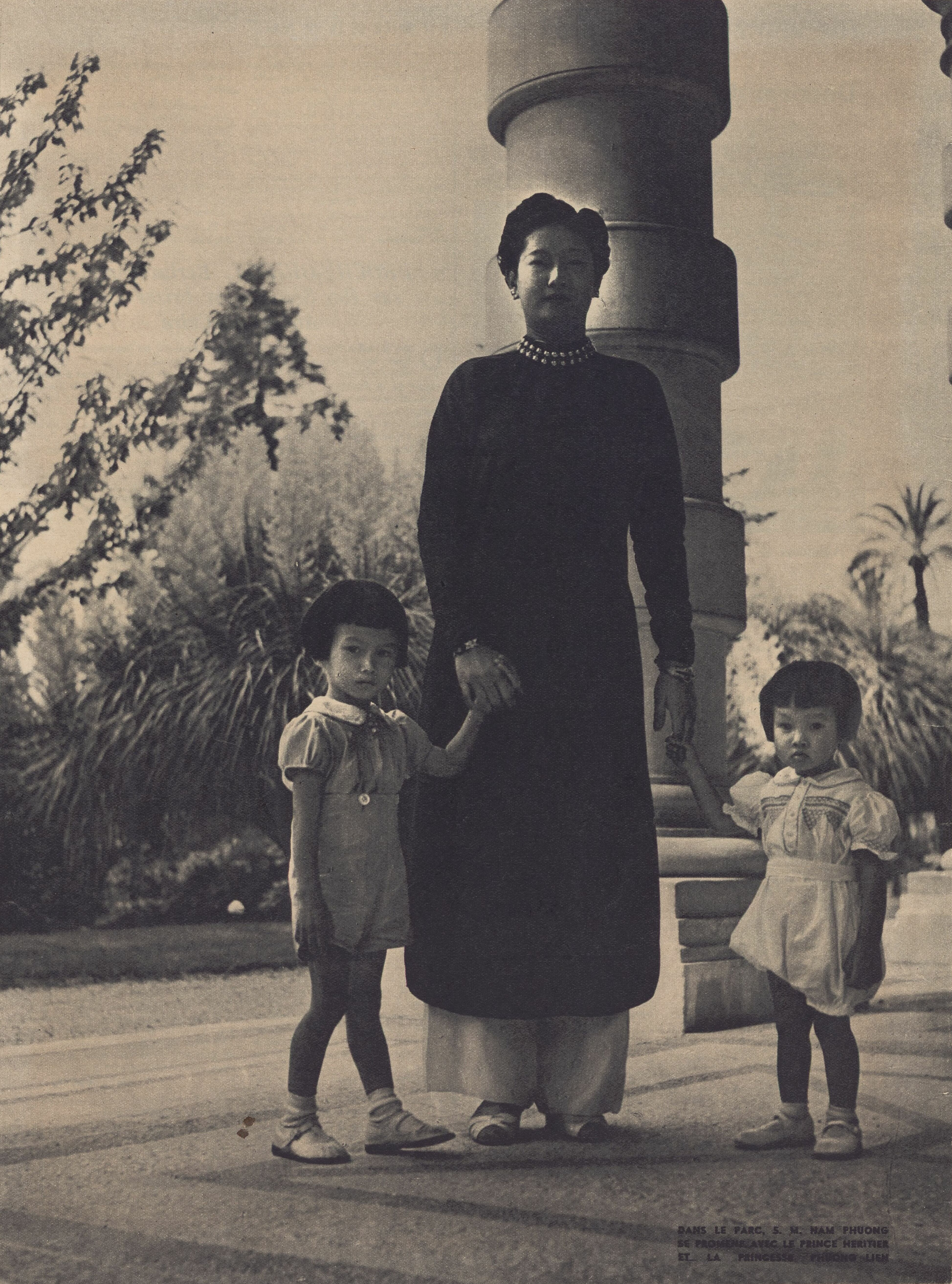 [Recueil. Portraits des princes d'Annam (XXe s.)]